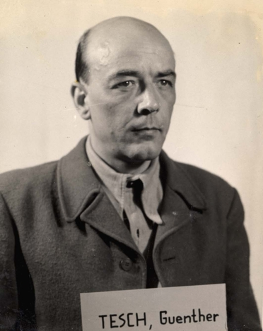 Günther Tesch (* 21. Oktober 1907 in Köln; † unbekannt) war ein deutscher Jurist und SS-Führer, der Rechtsberater des Lebensborn e.V. war. Im Prozess Rasse- und Siedlungshauptamt der SS (RuSHA-Prozess) wurde Tesch 1948 zur bereits verbüßten Haftzeit verurteilt und nach Urteilsverkündung freigelassen.